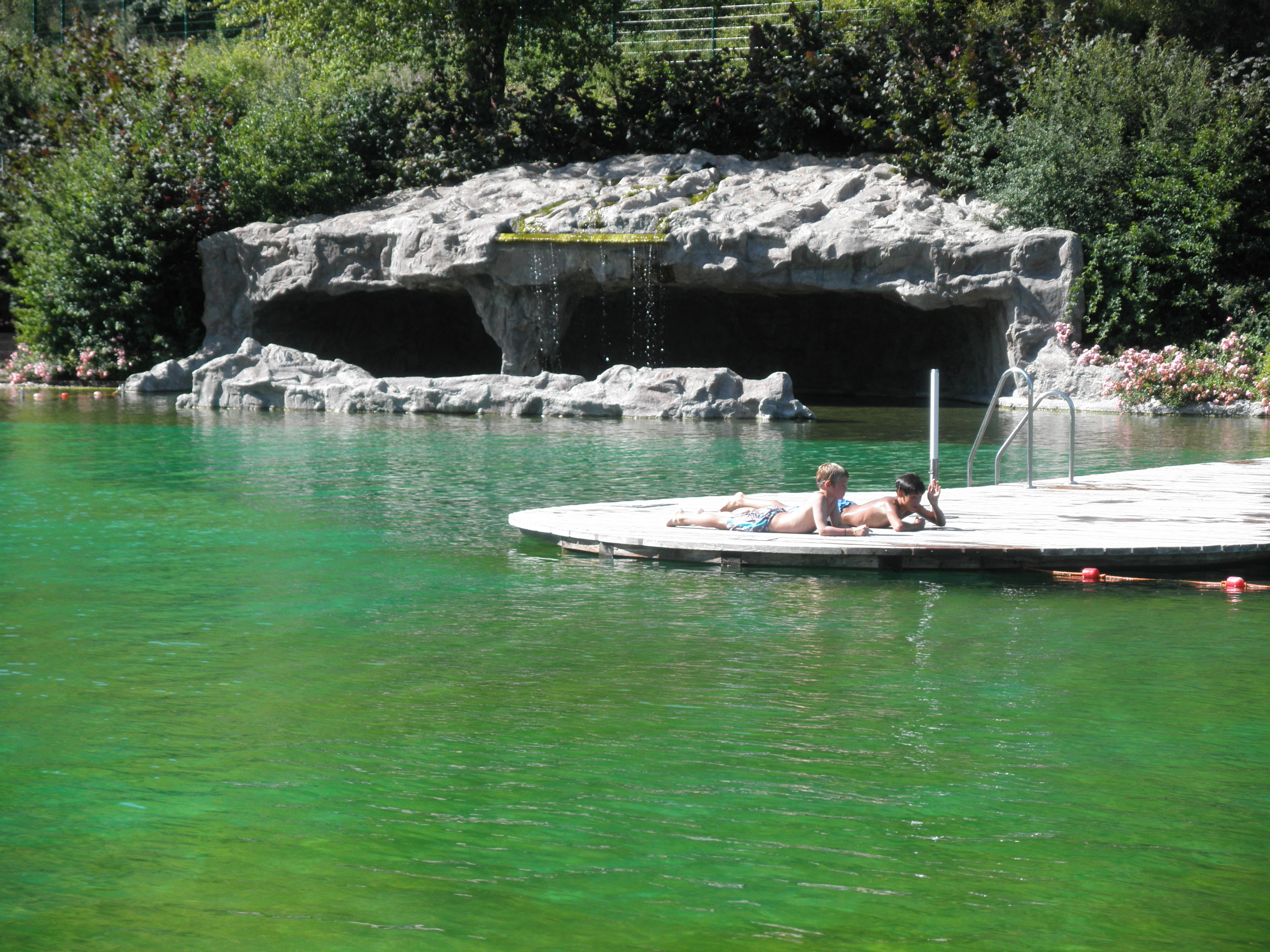 La Waldseebad, ekologia subĉiela naĝejo en Gaggenau, Germanio - la plej granda tiuspeca banejo en suda Germanio